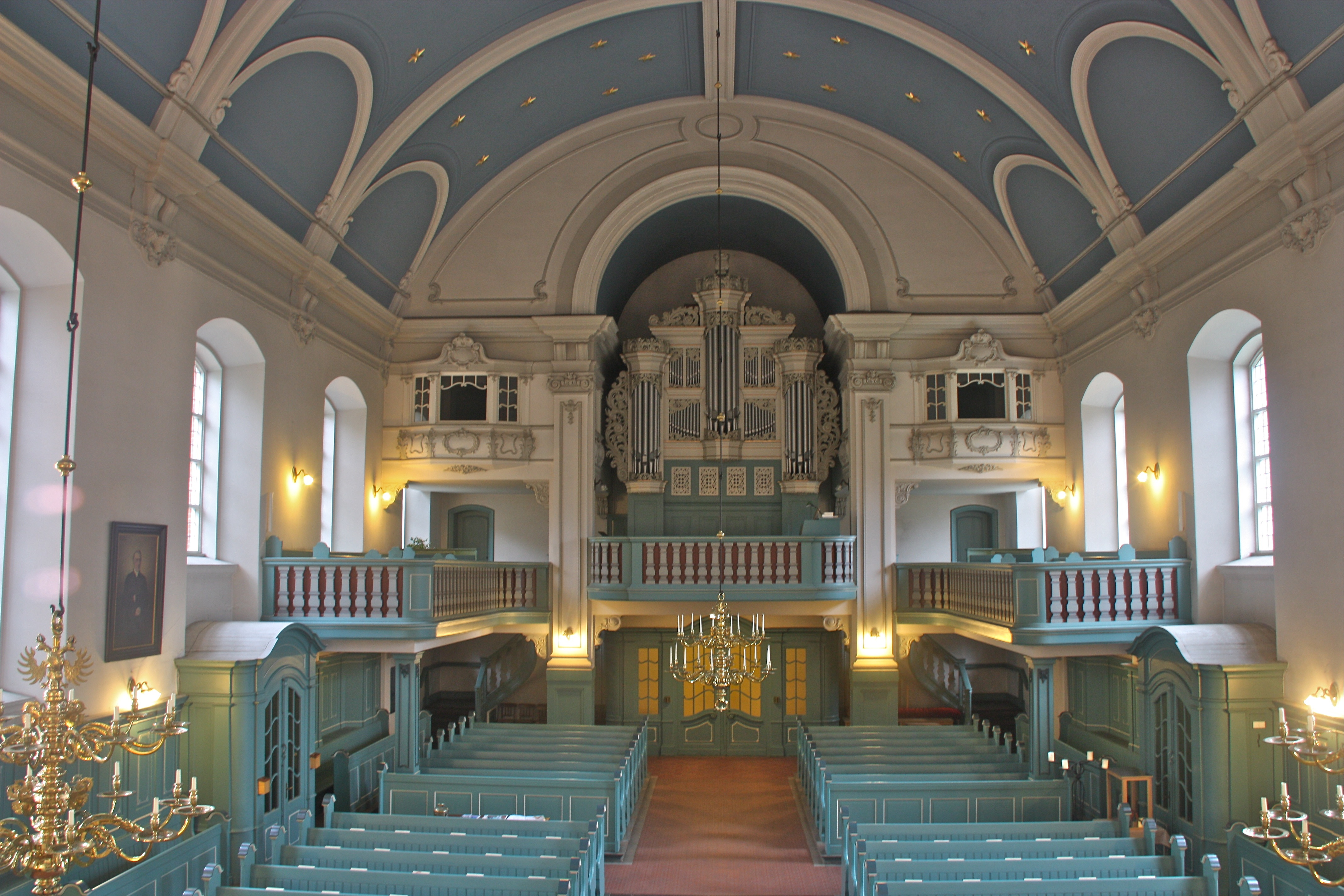 Hamburg, Billwerder, Kirche St. Nikolai, Innenraum, Blick zur OrgelThis is a photograph of an architectural monument.